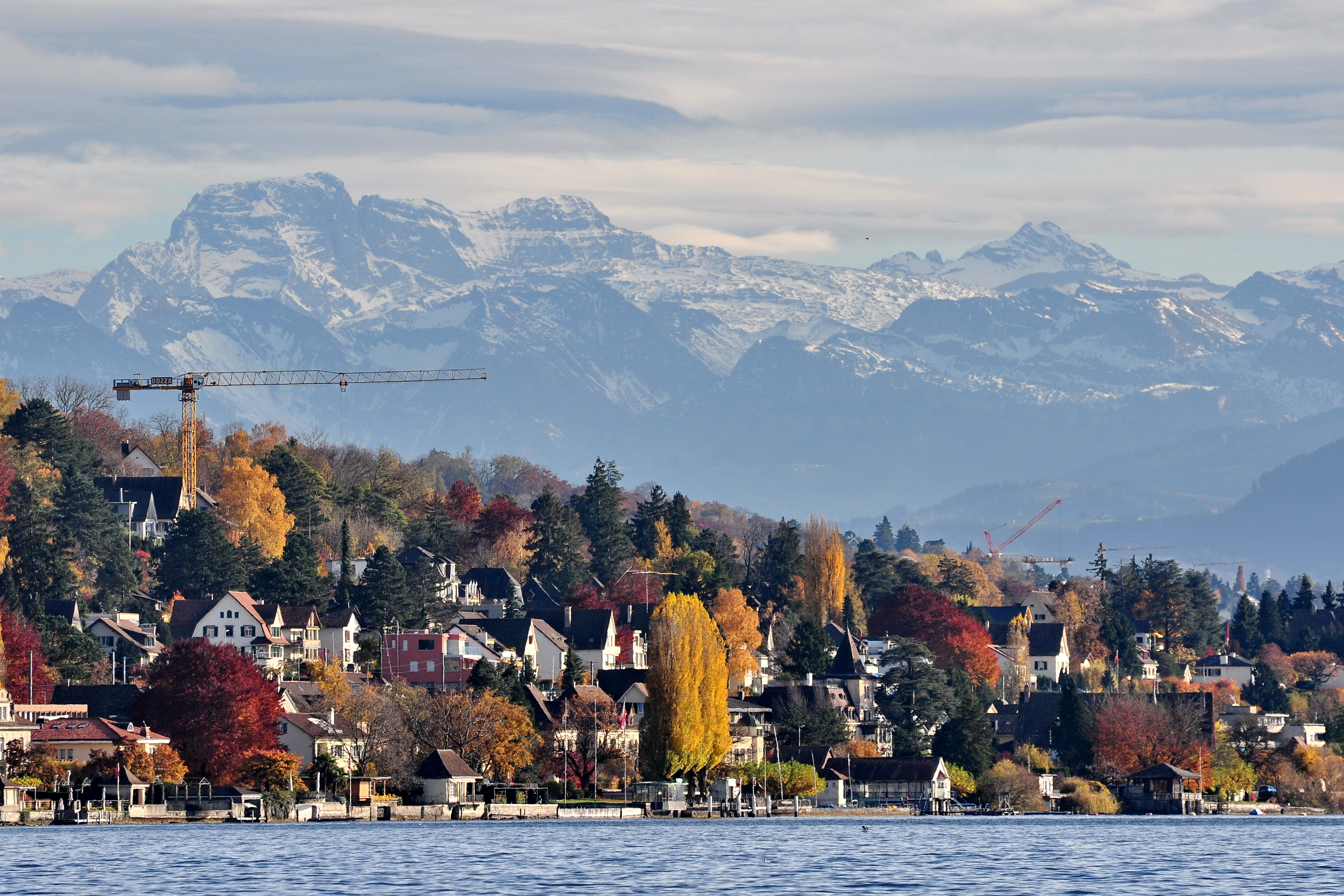 Küsnacht on Zürichsee lakeshore (Switzerland) as seen from Zürichhorn in Zürich-Seefeld, Zürichsee-Schiffahrtsgesellschaft (ZSG) landing gate to the left, Glarner Alpen in the background.